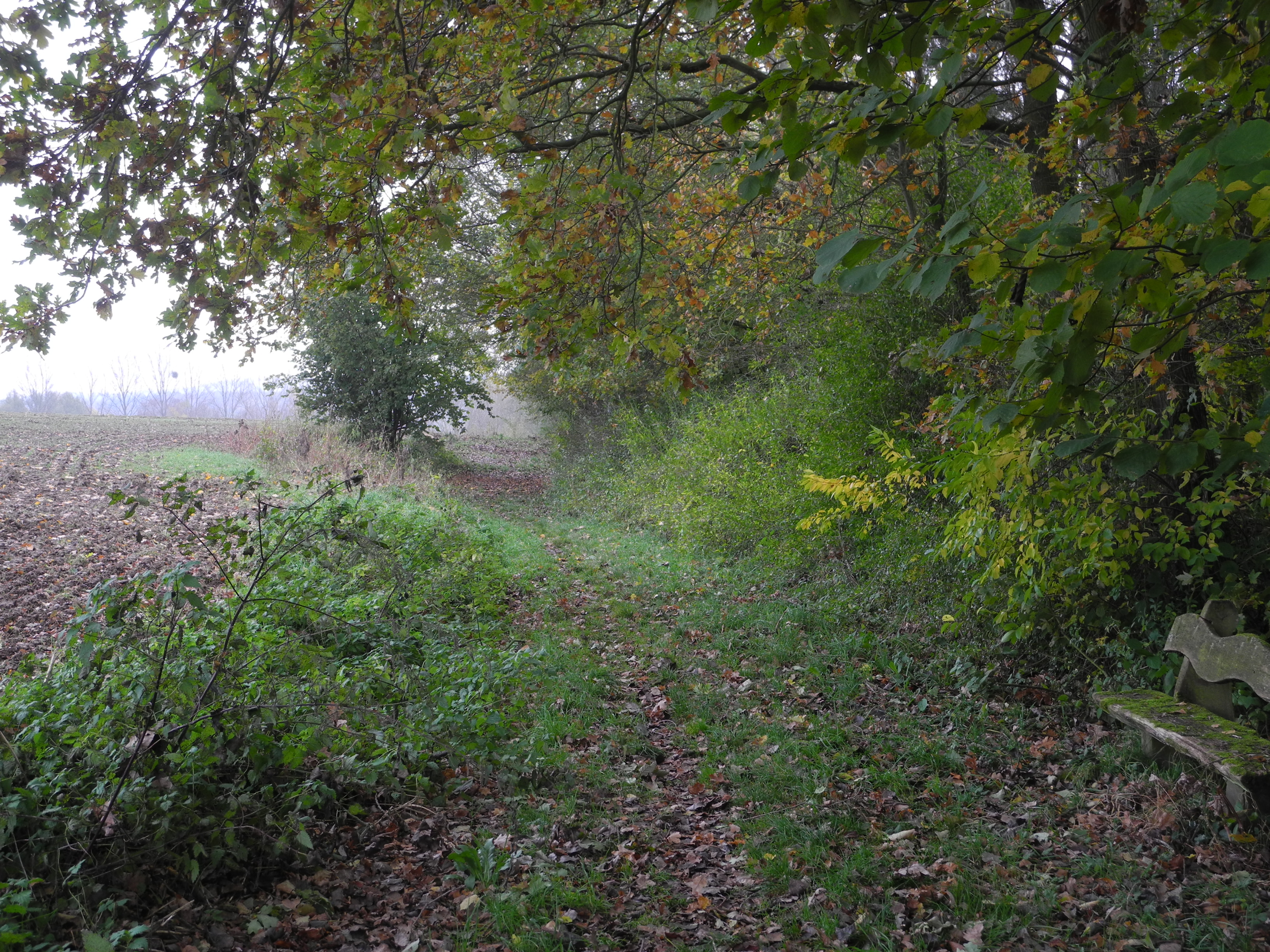 Naturschutzgebiet im Regierungsbezirk Kassel 1633012. „Vollmarshäuser Teiche“ ca. 500 m nordöstlich des Ortsrandes von Vollmarshausen in der Gemeinde Lohfelden im Landkreis Kassel.Verlauf des Wanderweges Franzosenstraße (F) am Nordostrand des NSG.